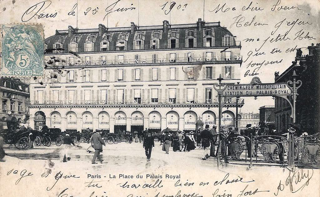 Carte postale représentant la place du Palais-Royal, vers l'est, avec les Grands Magasins du Louvre dans le fond. Sur la droite, une pancarte provisoire est supportée par l'édicule Guimard.